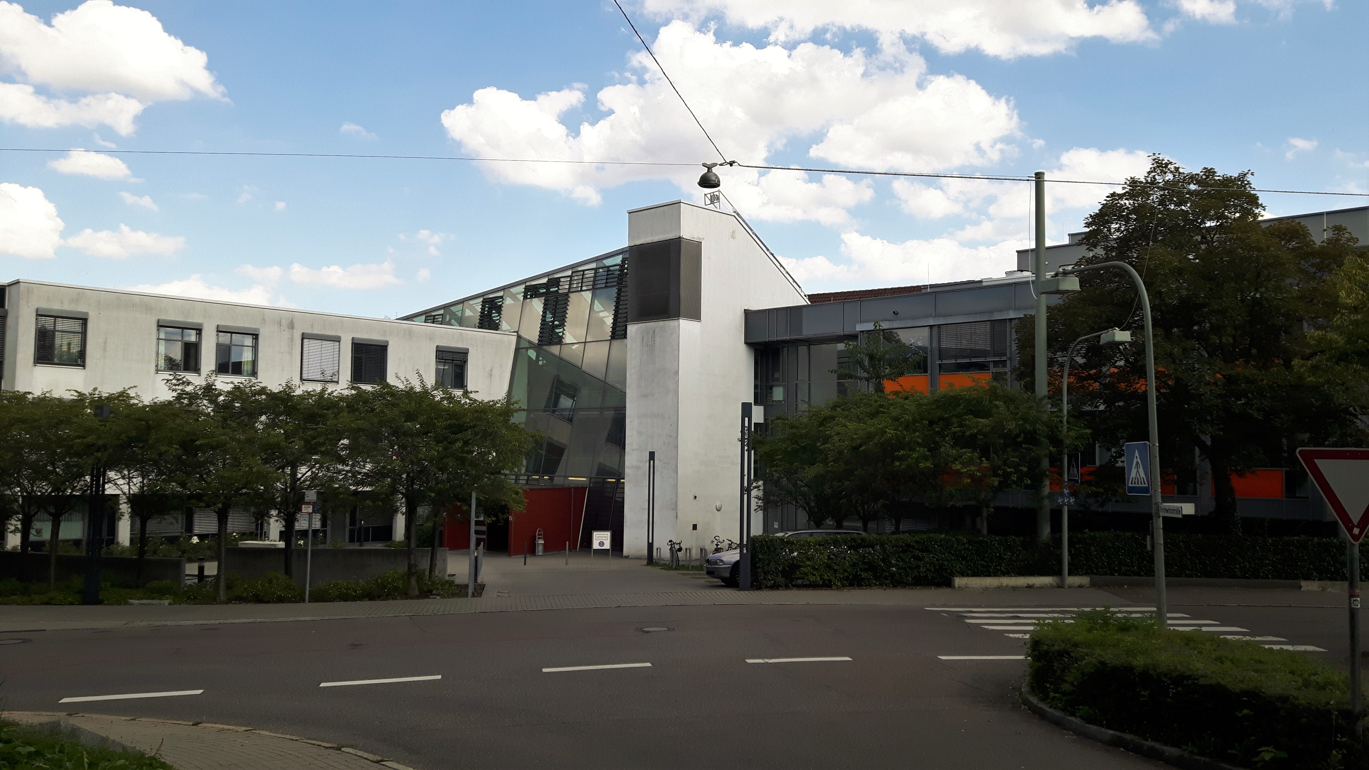 Eingangsbereich der Klinik für Kinder- und Jugendmedizin des Universitätsklinikums Ulm am Standort Michelsberg.